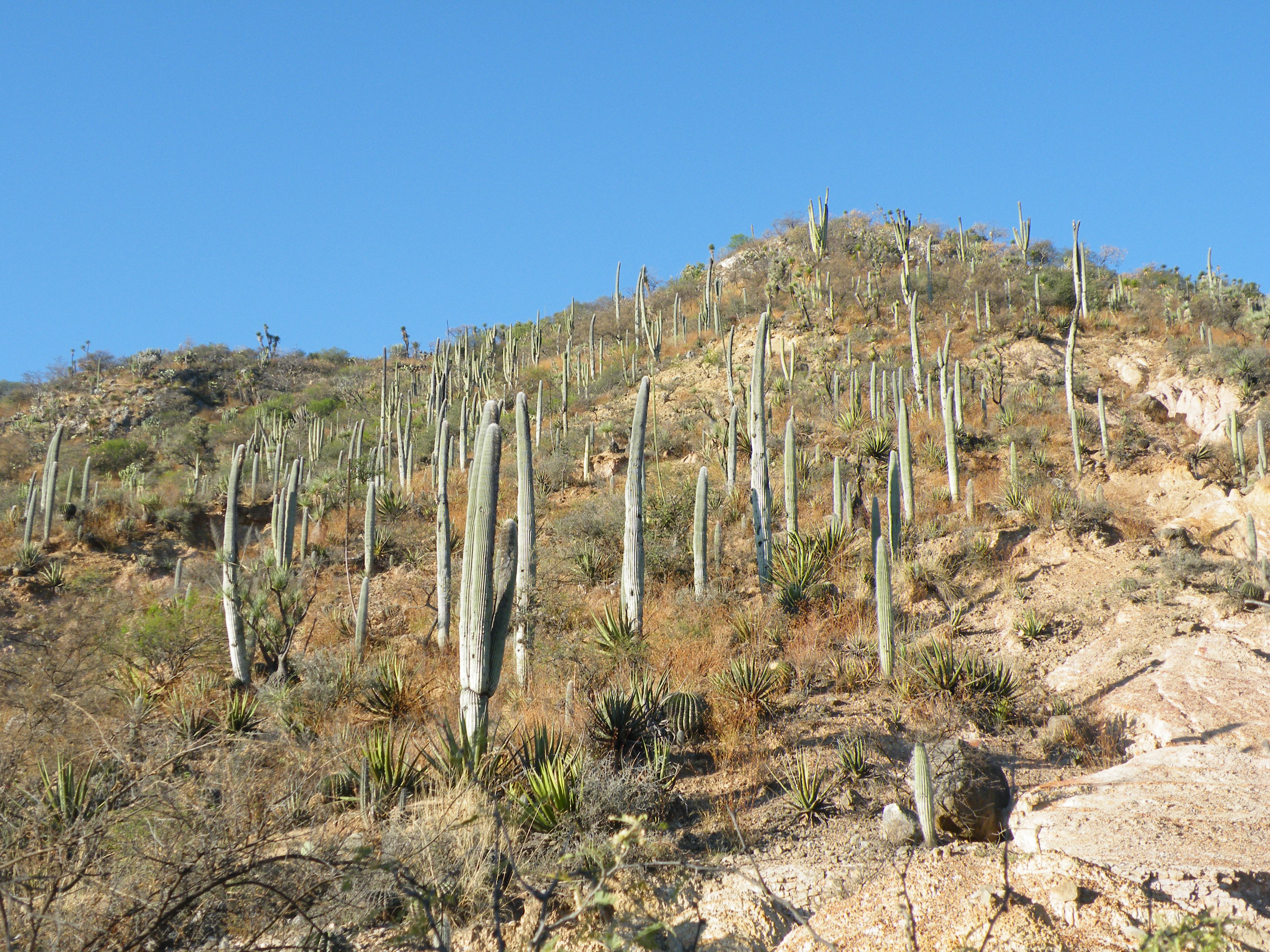 Zapotitlan De Las Salinas, Puebla